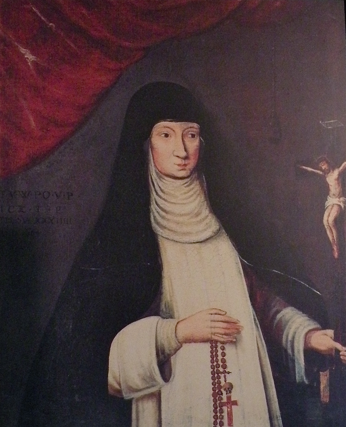 Eva Magdalena Enzmilner, erste Priorin des Dominikanerinnenklosters in Windhaag, Bezirk Perg, Oberösterreich